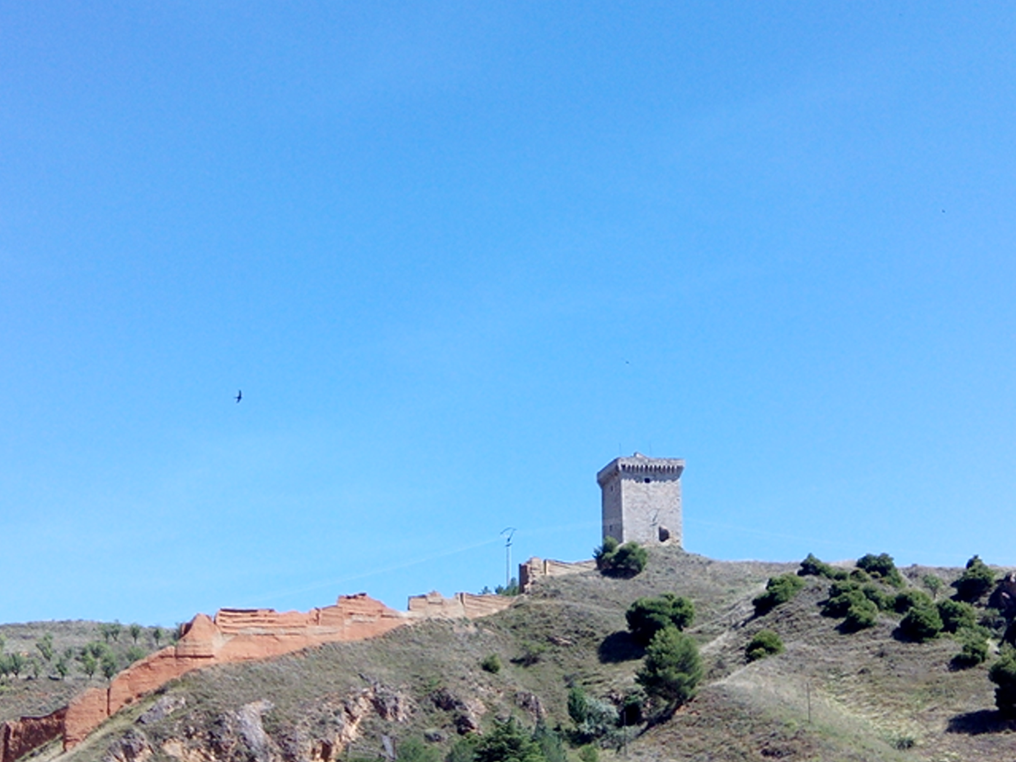 Torre solitaria de Daroca